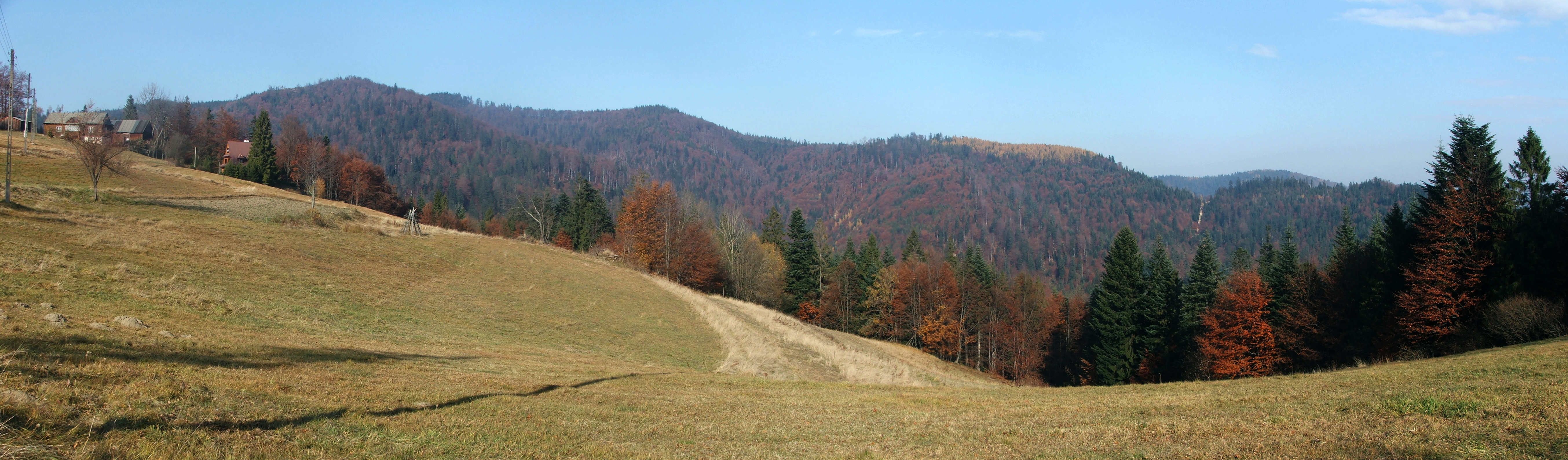 Obidza w Piwnicznej-Zdroju. Widok na Małego Rogacza i dolinę Czercza